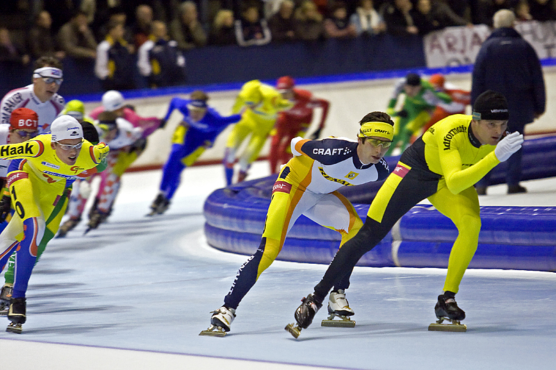 Dutch skater Karlo Timmerman